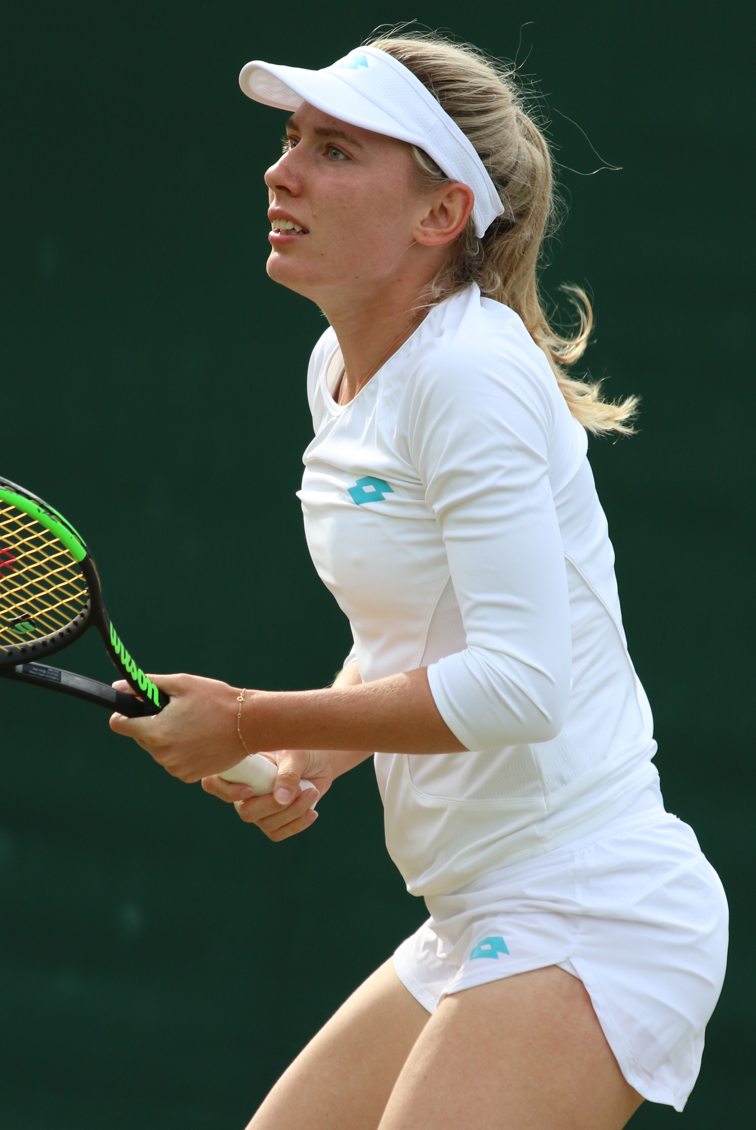 Alexandrova WM19 (36)